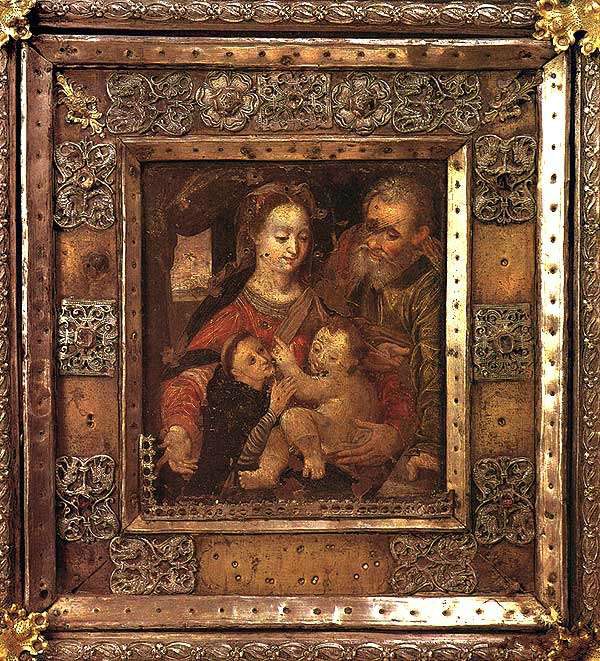 Святое сямейства з Францыскам. 16 ст. Рама. Францысканскі касцёл Успення Марыі. Пінск.